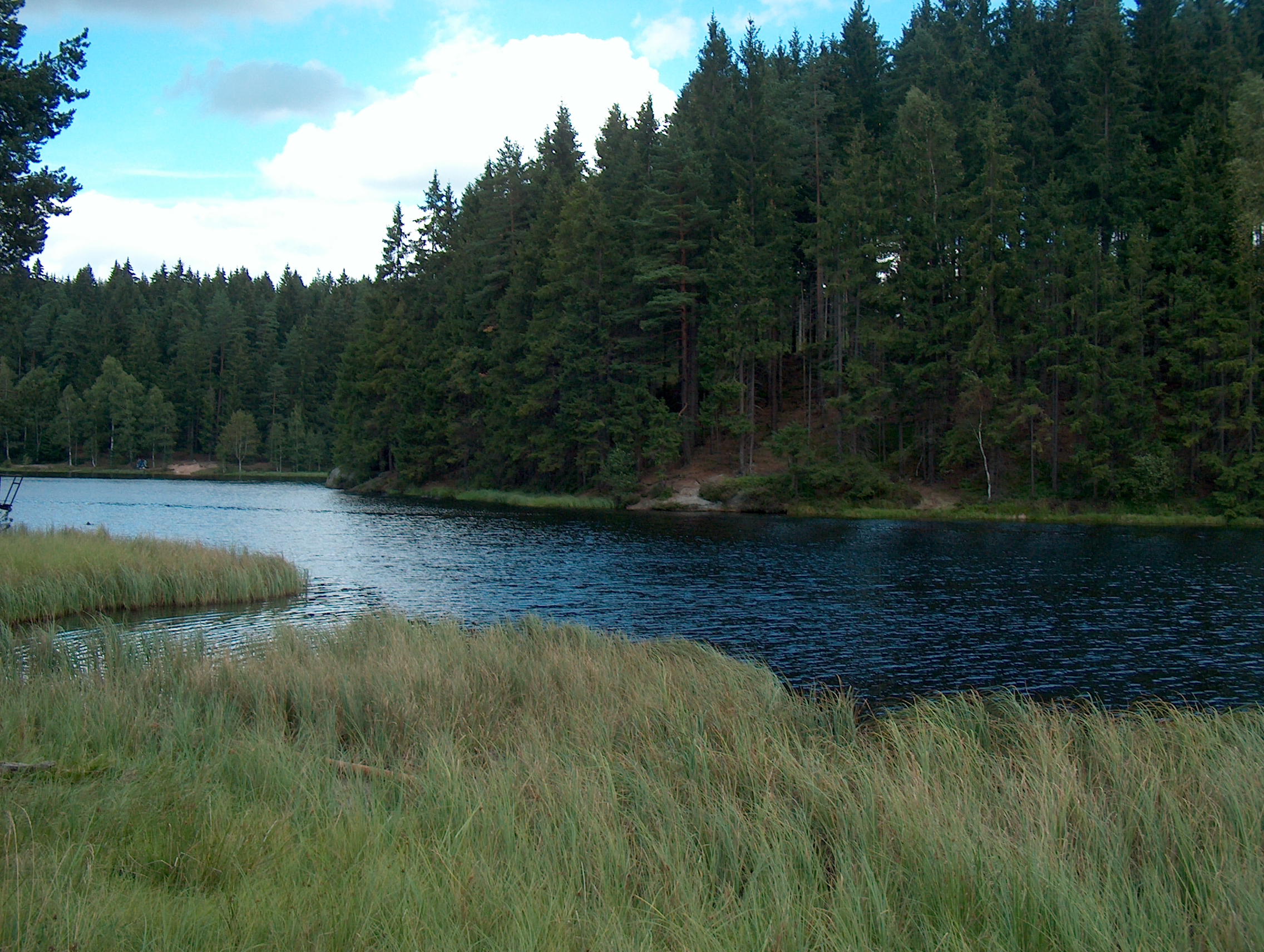 Vogtlandsee im August